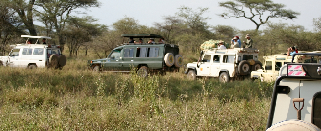 Foto Safari in Serengeti, Tanzania